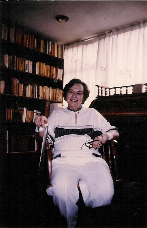 La escritora y cuentista mexicana, Inés Arredondo (1928-1989), en su departamento en México, D.F.